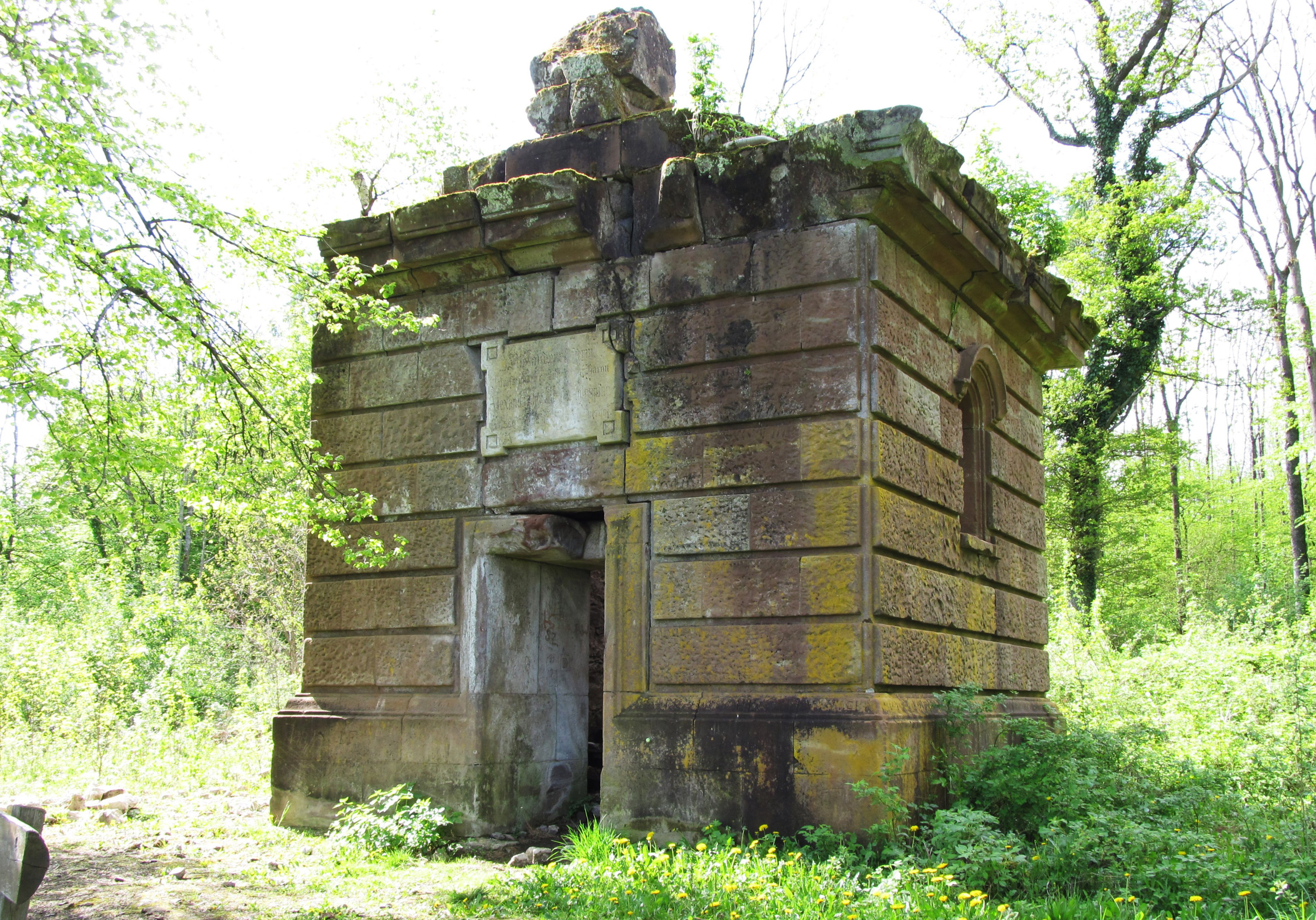 Ruine des Alexanderturms auf dem Kahlenberg